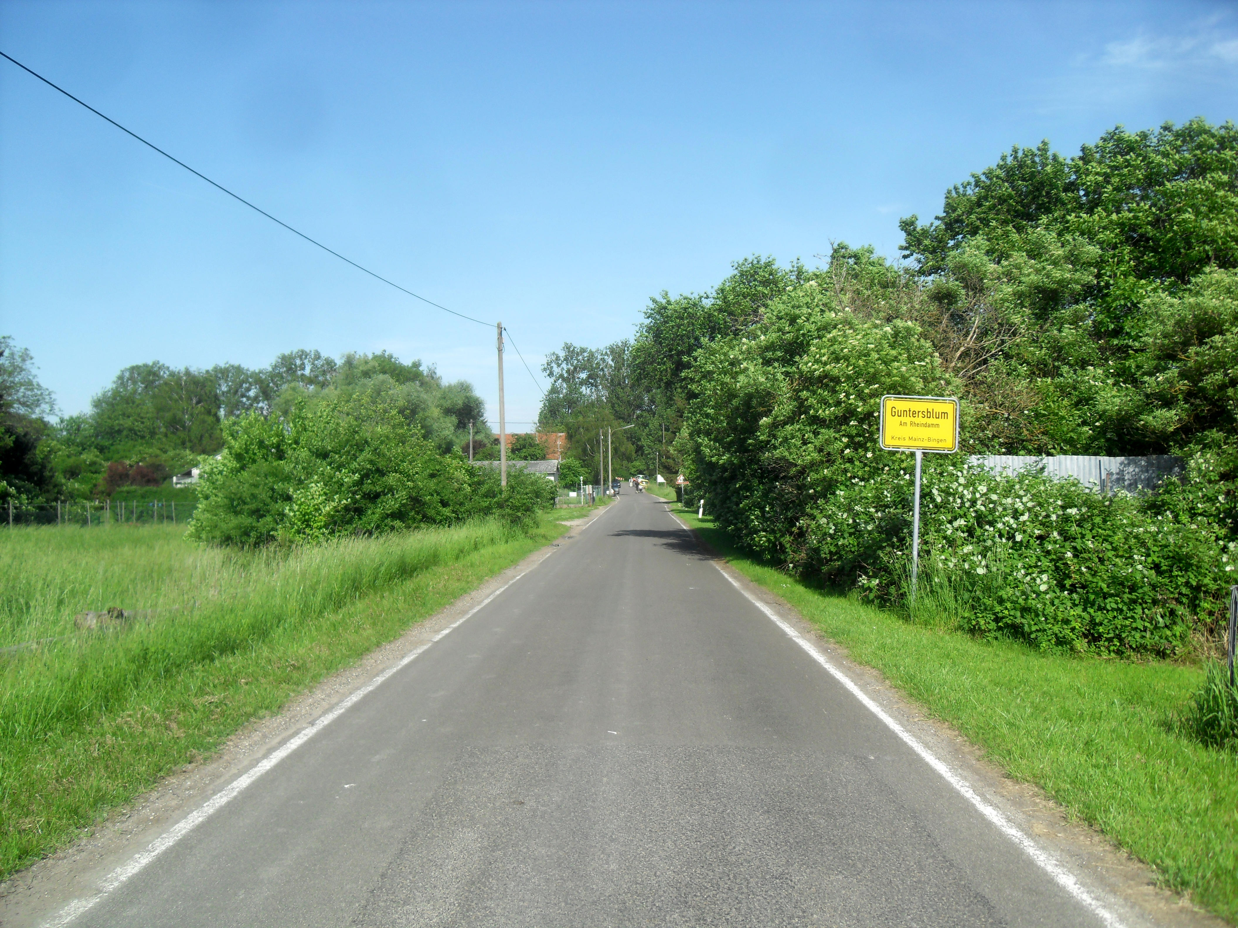 Die Einfahrt des Guntersblumer Ortsteils Guntersblum am Rheindamm auf der K 43 in Rheinhessen (Deutschland)